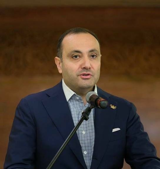 Посол Республики Армения в РФ Вардан Тоганян